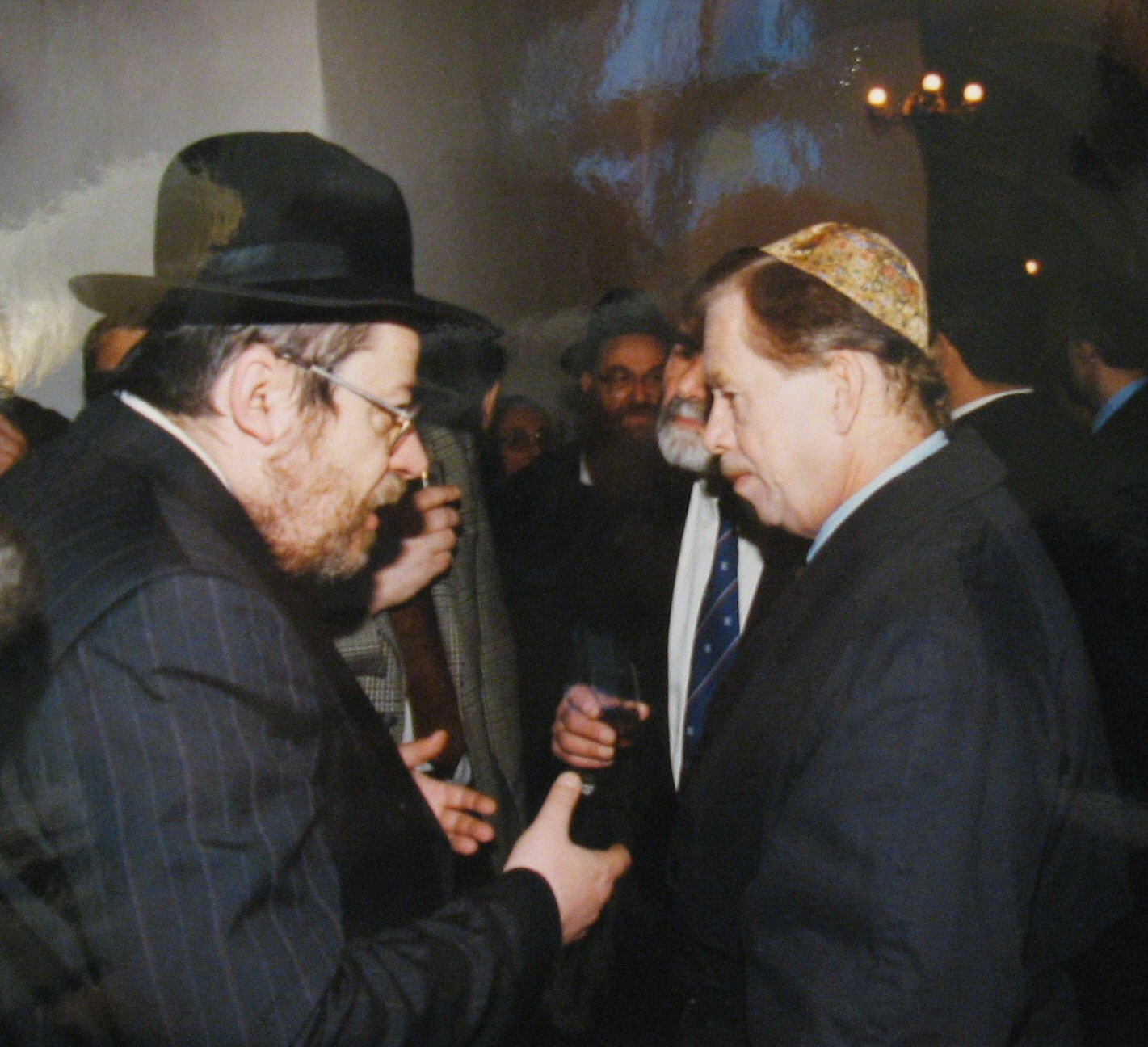 Karol Sidon talking to Vaclav Havel